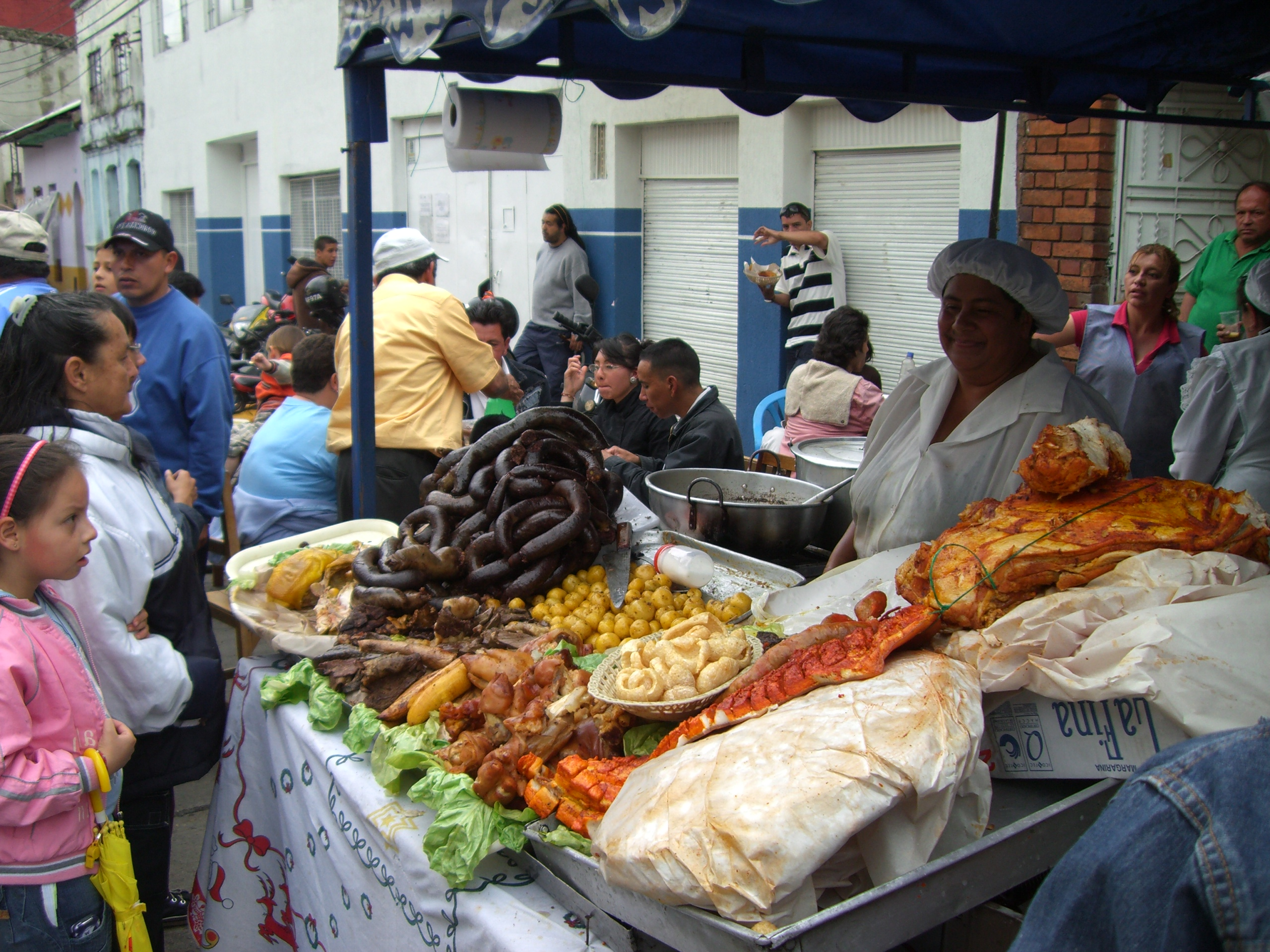 Comida popular típica de la región central de Colombia (Festival de la chicha).